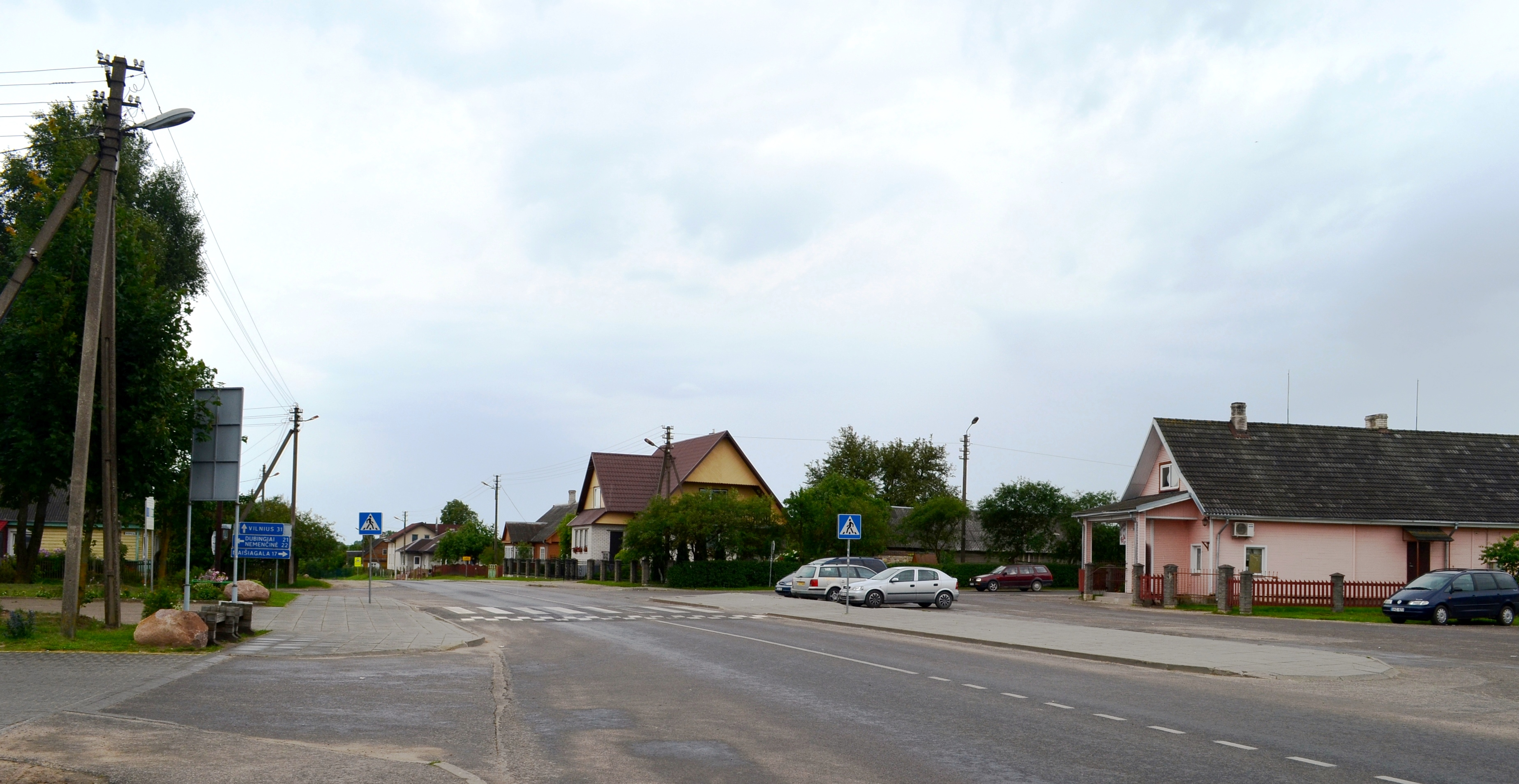 Paberžė, Vilniaus r.